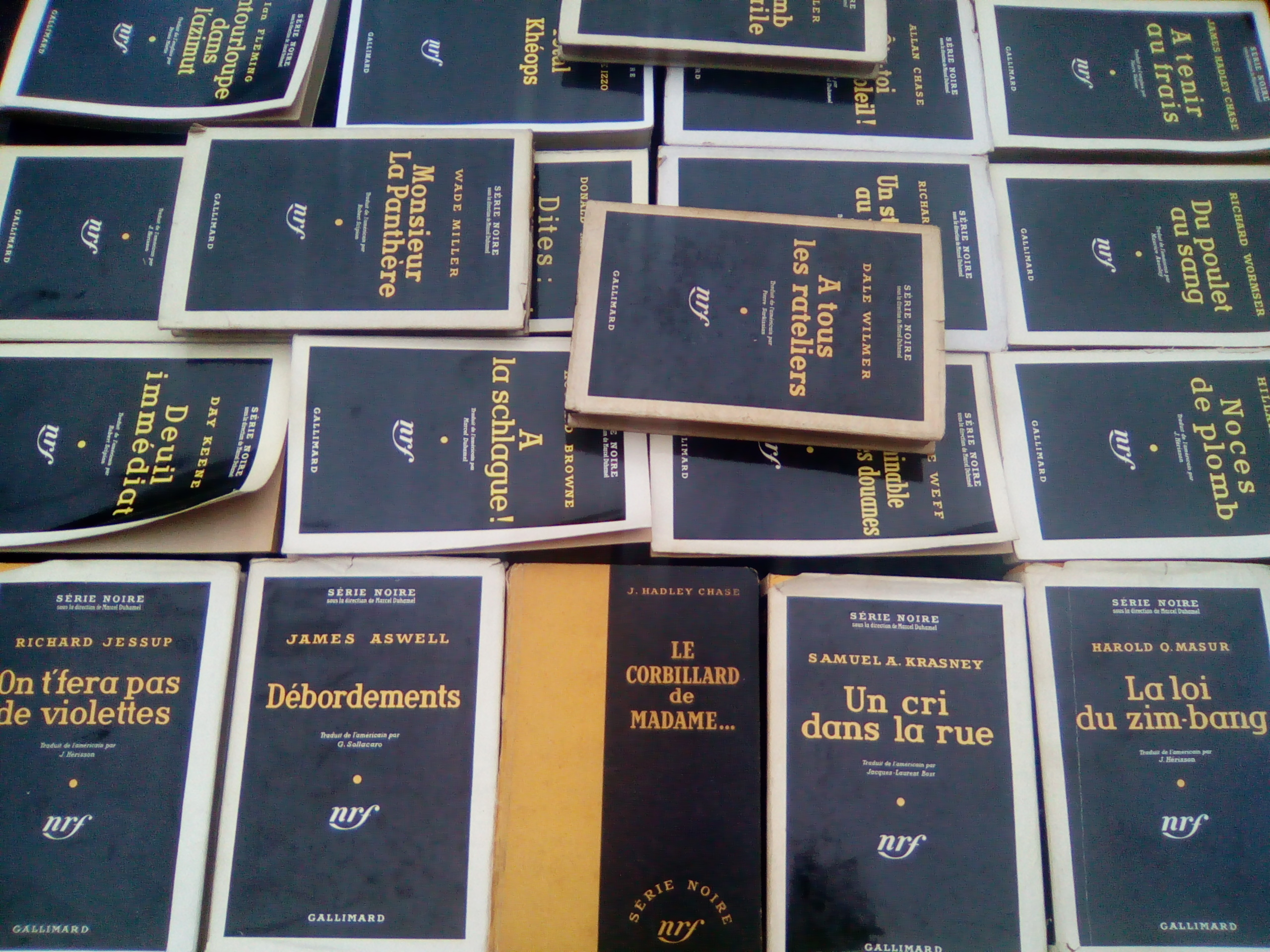 Ouvrages de la Série noire sur un étal de bouquiniste.